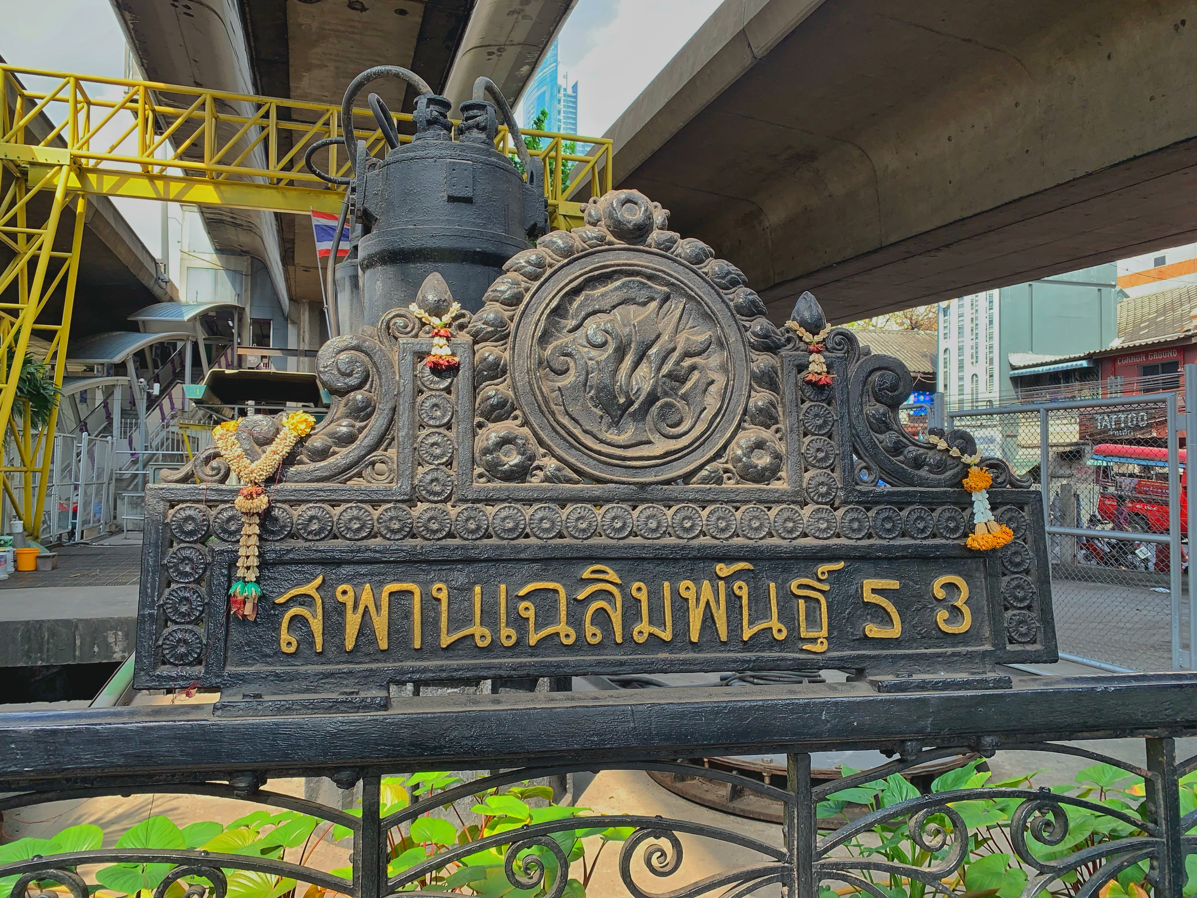 สะพานเฉลิมพันธุ์ ๕๓